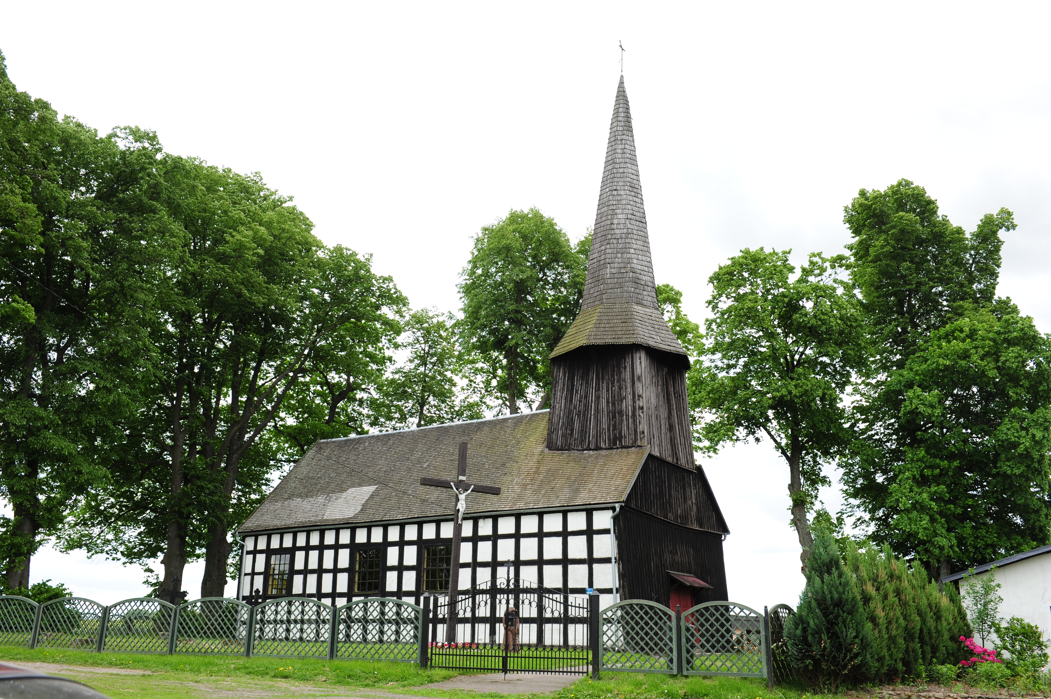 Sierpowo - dawny kościół ewangelicki, obecnie rzymskokatolicki filialny p.w. św. Tadeusza Judy Apostoła, 1668